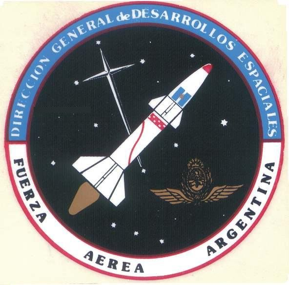 Escudo de la Dirección General de Desarrollos Espaciales de la Fuerza Aérea Argentina